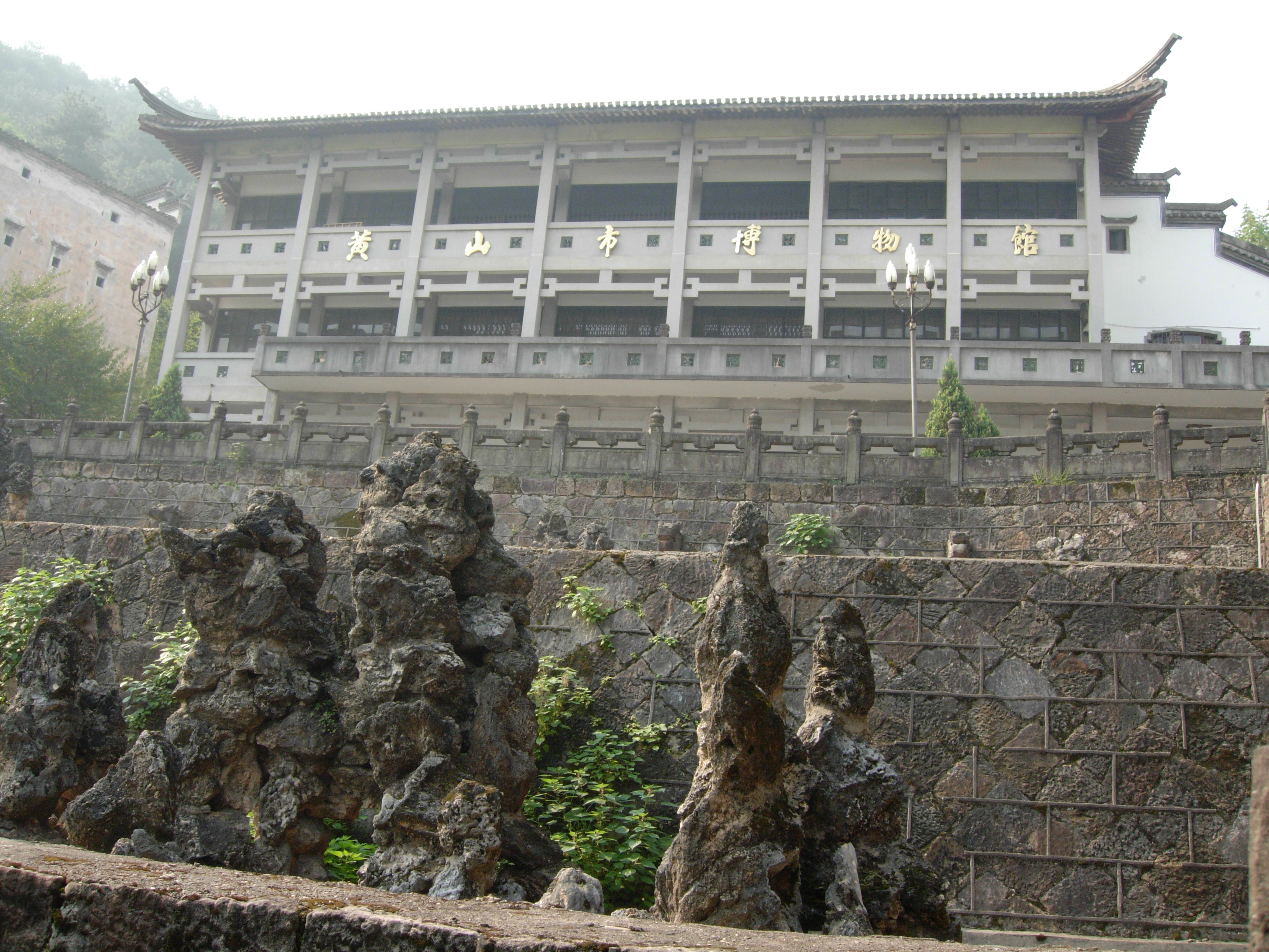 1中國黃山China Mount Huangshan